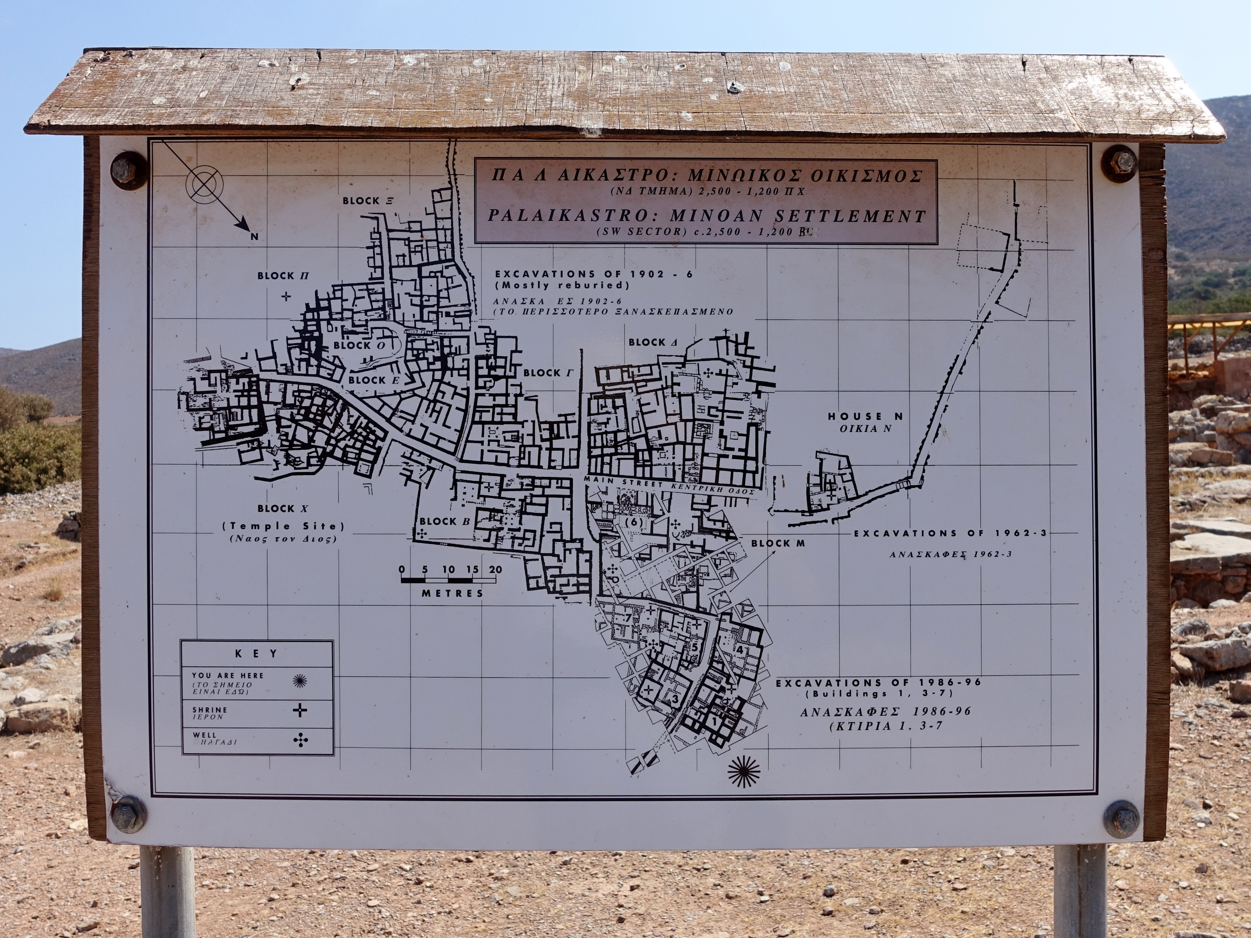 Lageplan der Ausgrabungsstätte von Roussolakkos (Ρουσσόλακκος) nahe Palekasto, Gemeinde Sitia, Kreta, Griechenland